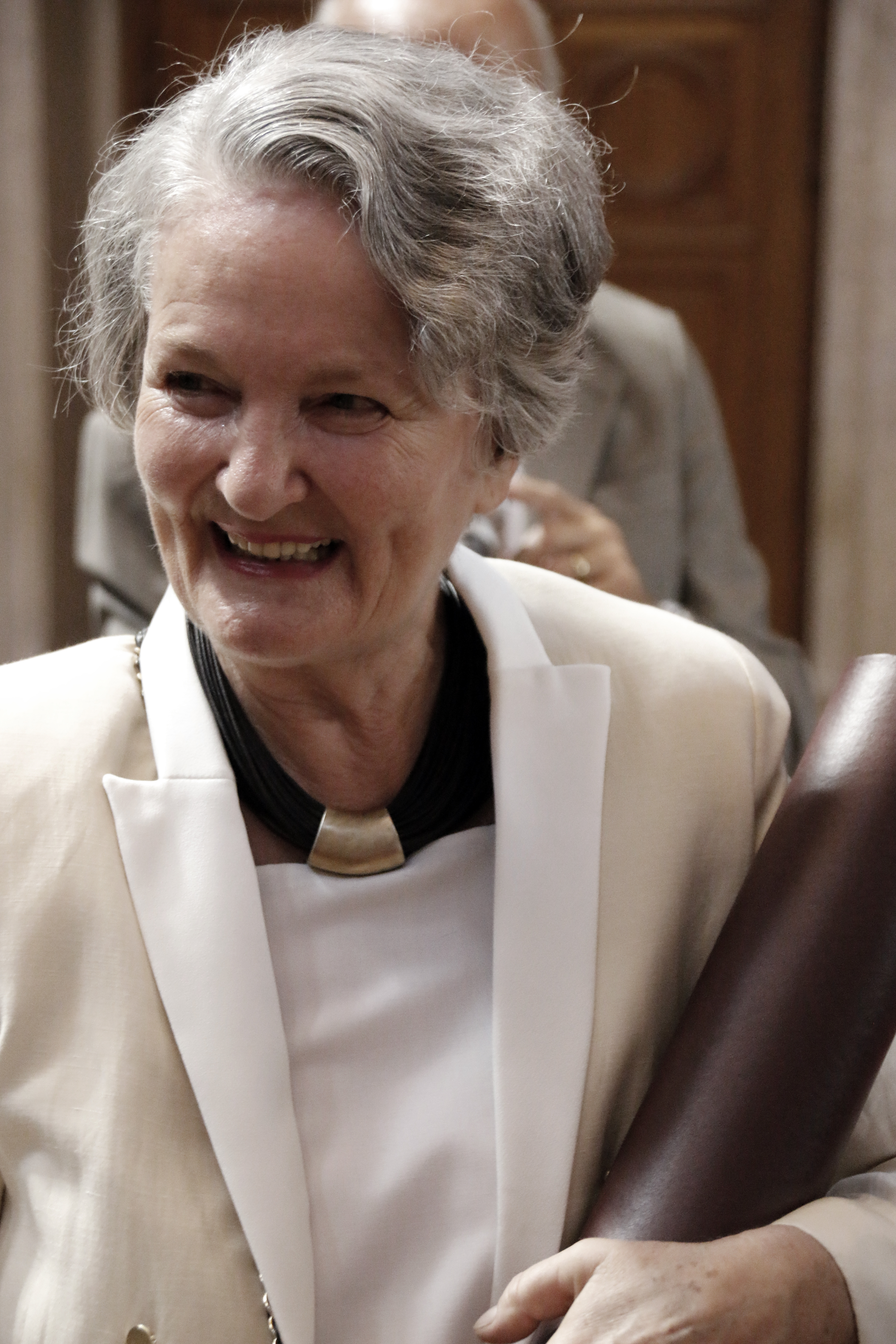 Brigitte Thonhauser-Merk Master Promotion an der Universität Wien